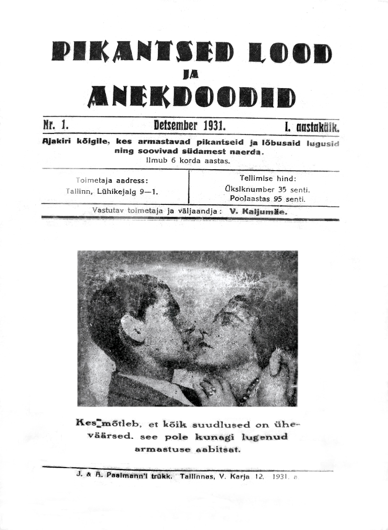 Pikantsed lood ja anekdoodid, esikaas